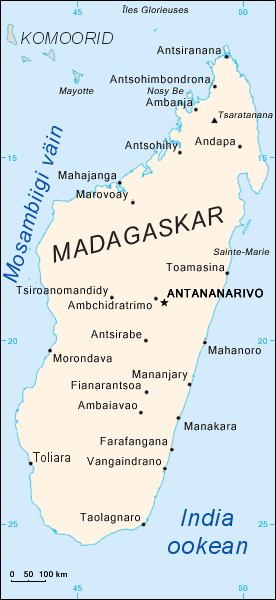 Madagaskari kaart